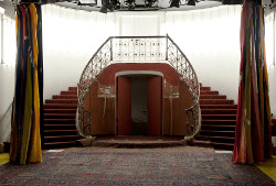 die Treppe im ehemaligen "Fattys Saloon"